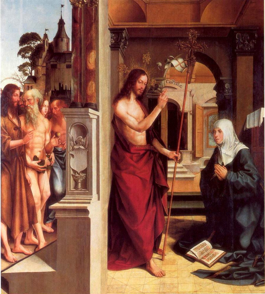 Aparição de Cristo à Virgem